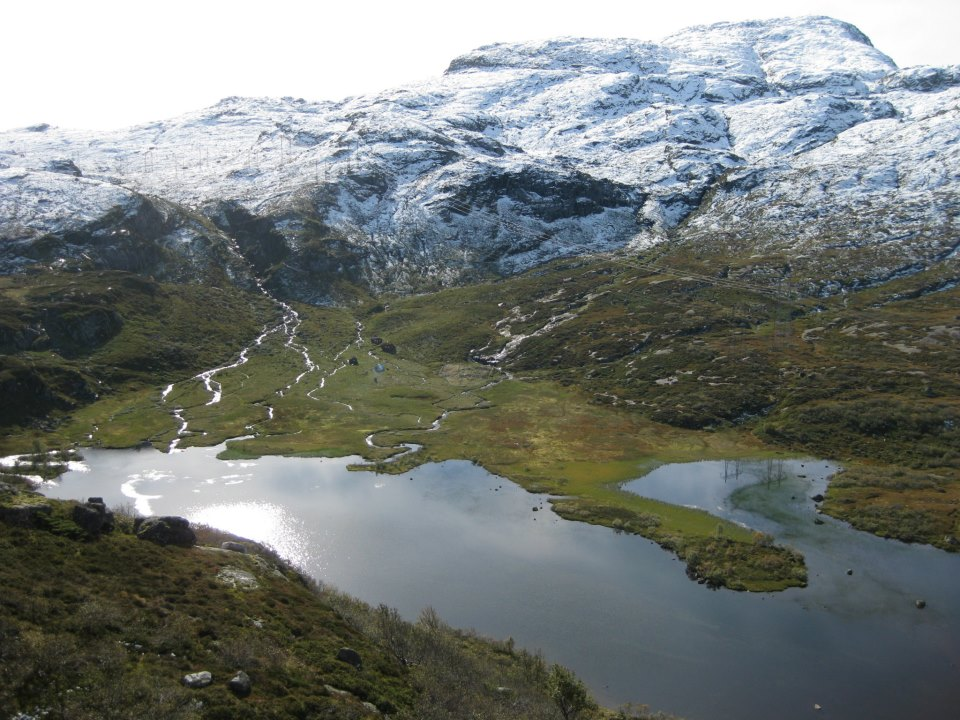 Oversiktsbilde av Finnabu, Sauda. Bildet er tatt fra Finnabunuten september 2012.